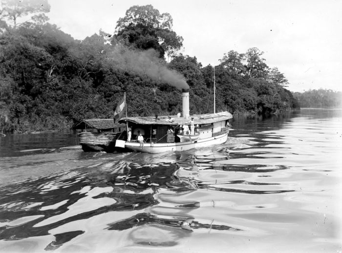 Negatief. Het gouvernements S.S. Selaton op de rivier Barito, Borneo